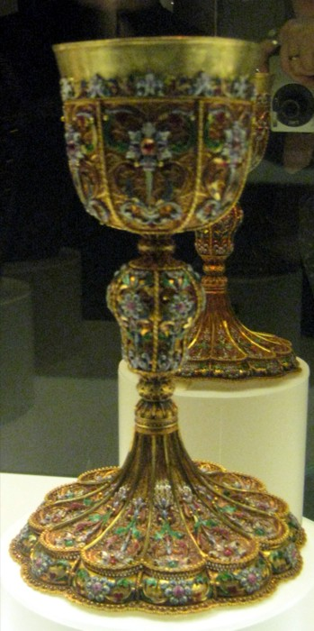 Потир, Армения, начало 19 века. Armenian chalice, early 19 c.